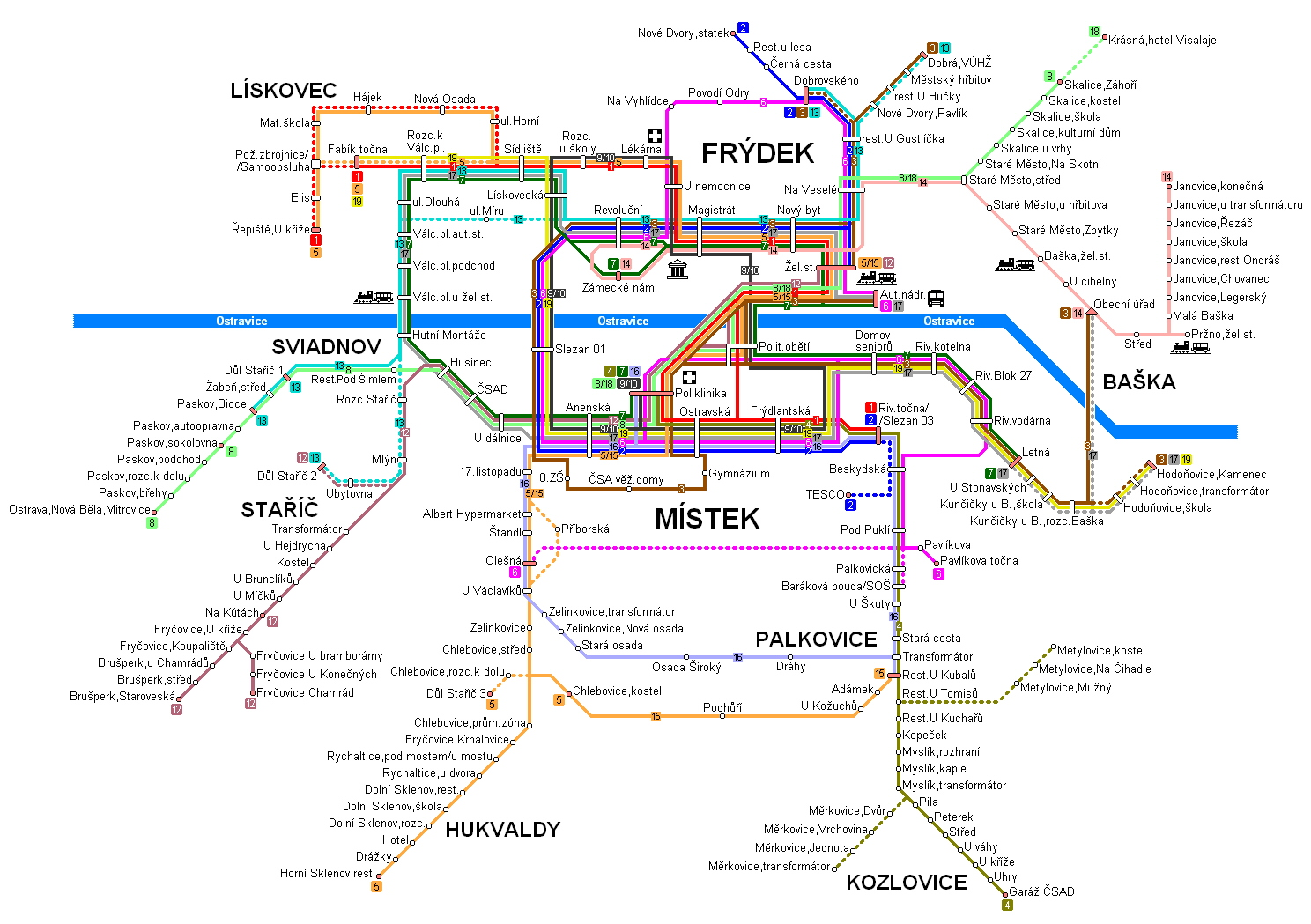 Mapa sítě MHD ve Frýdku-Místku v roce 2014.